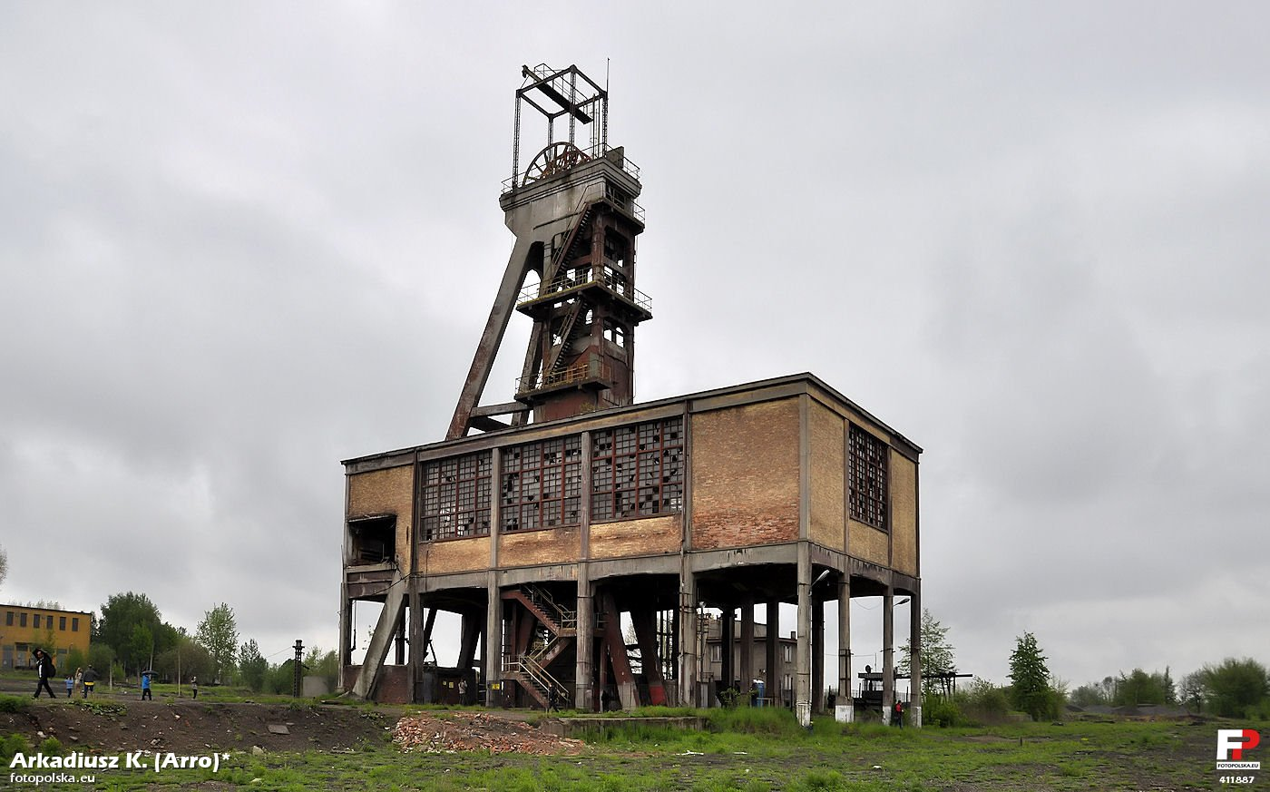 Pozostałość po KWK Andaluzja - wieża i budynek nadszybia szybu Żeromski.